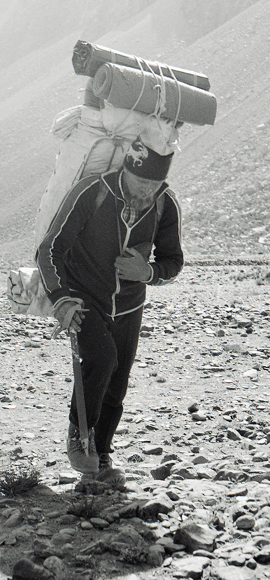 Enn Branno